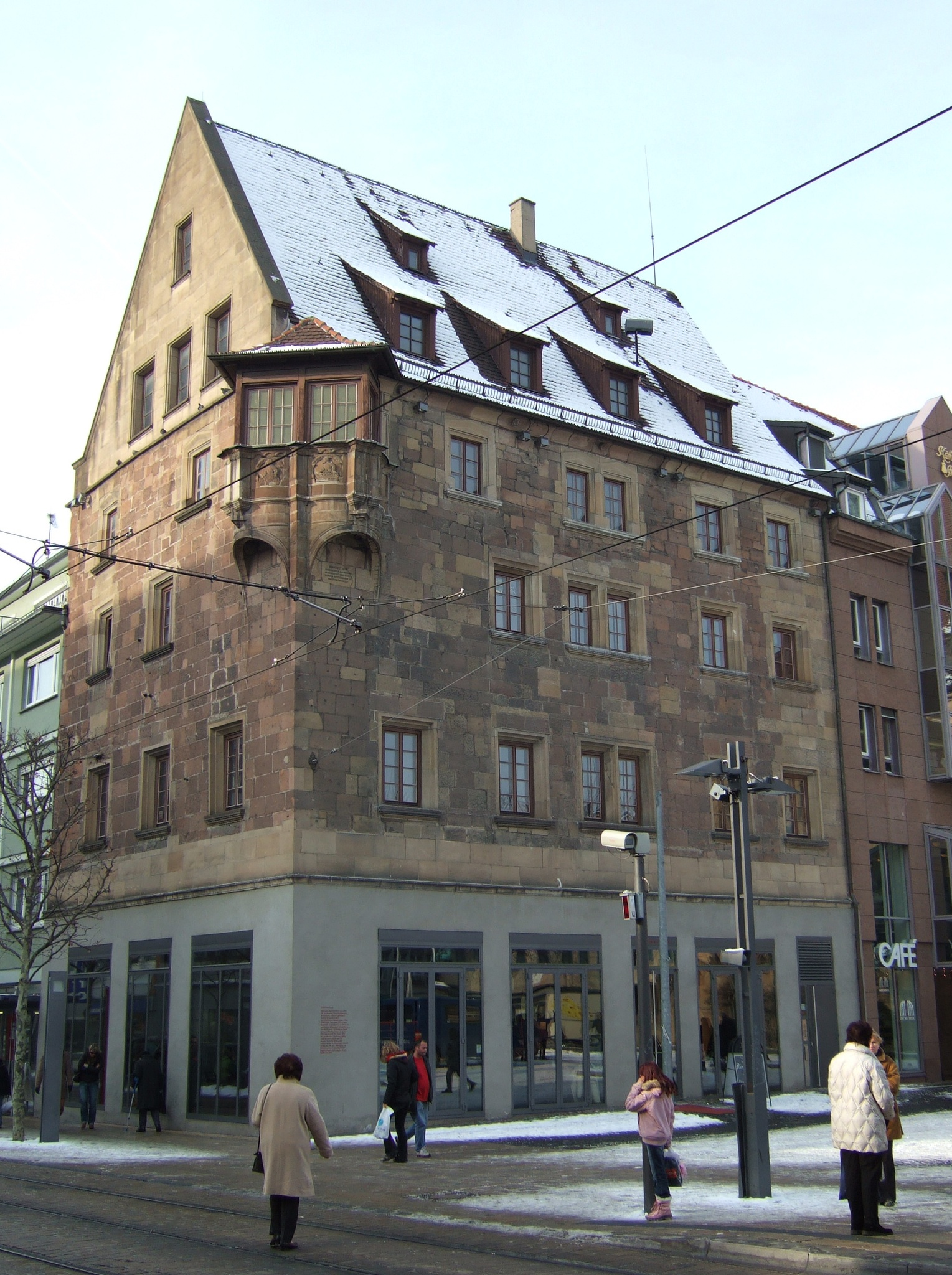 "Käthchenhaus" of Heilbronn - Germany